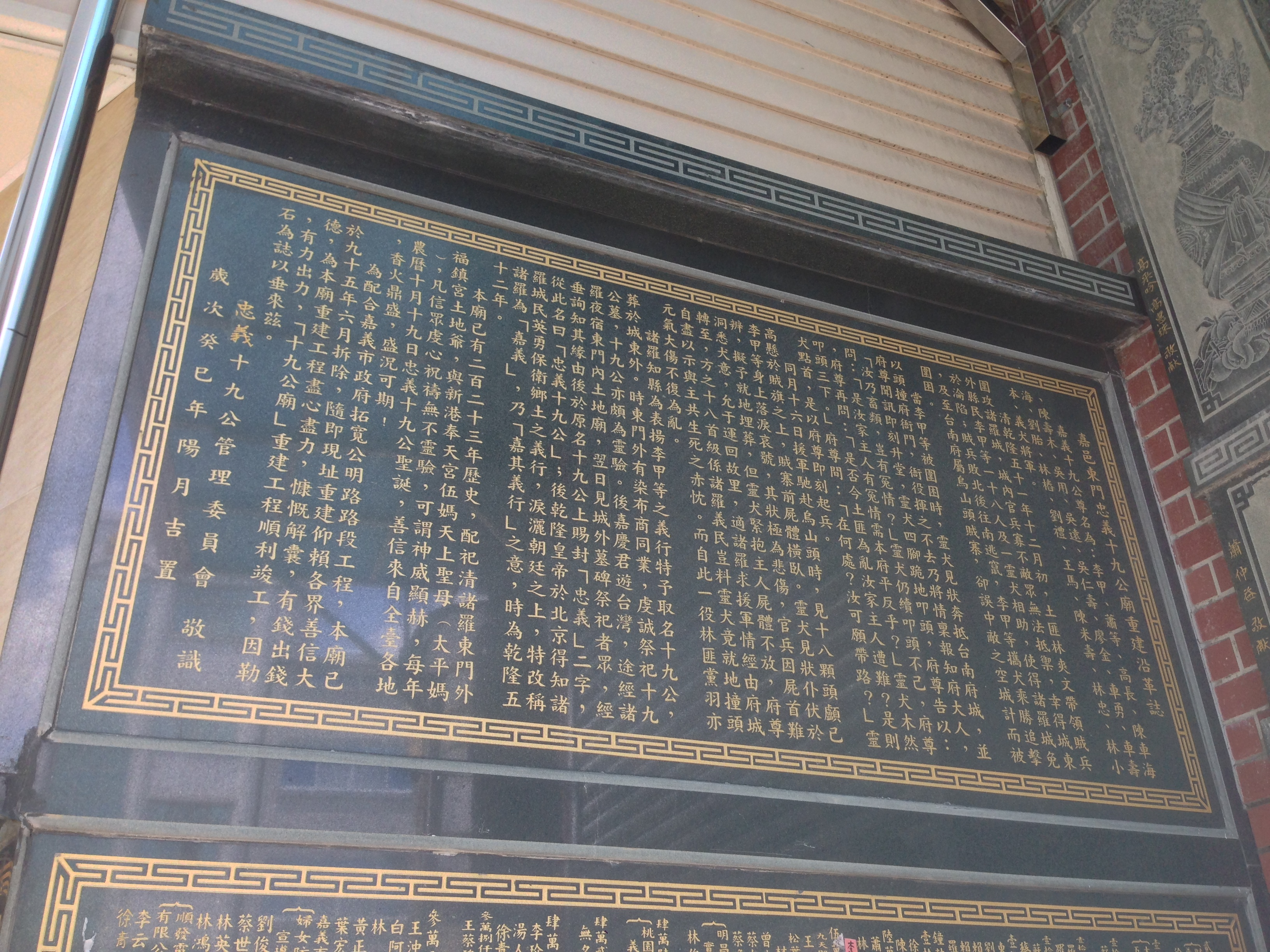 中文（台灣）: 忠義十九王公廟重建沿革誌